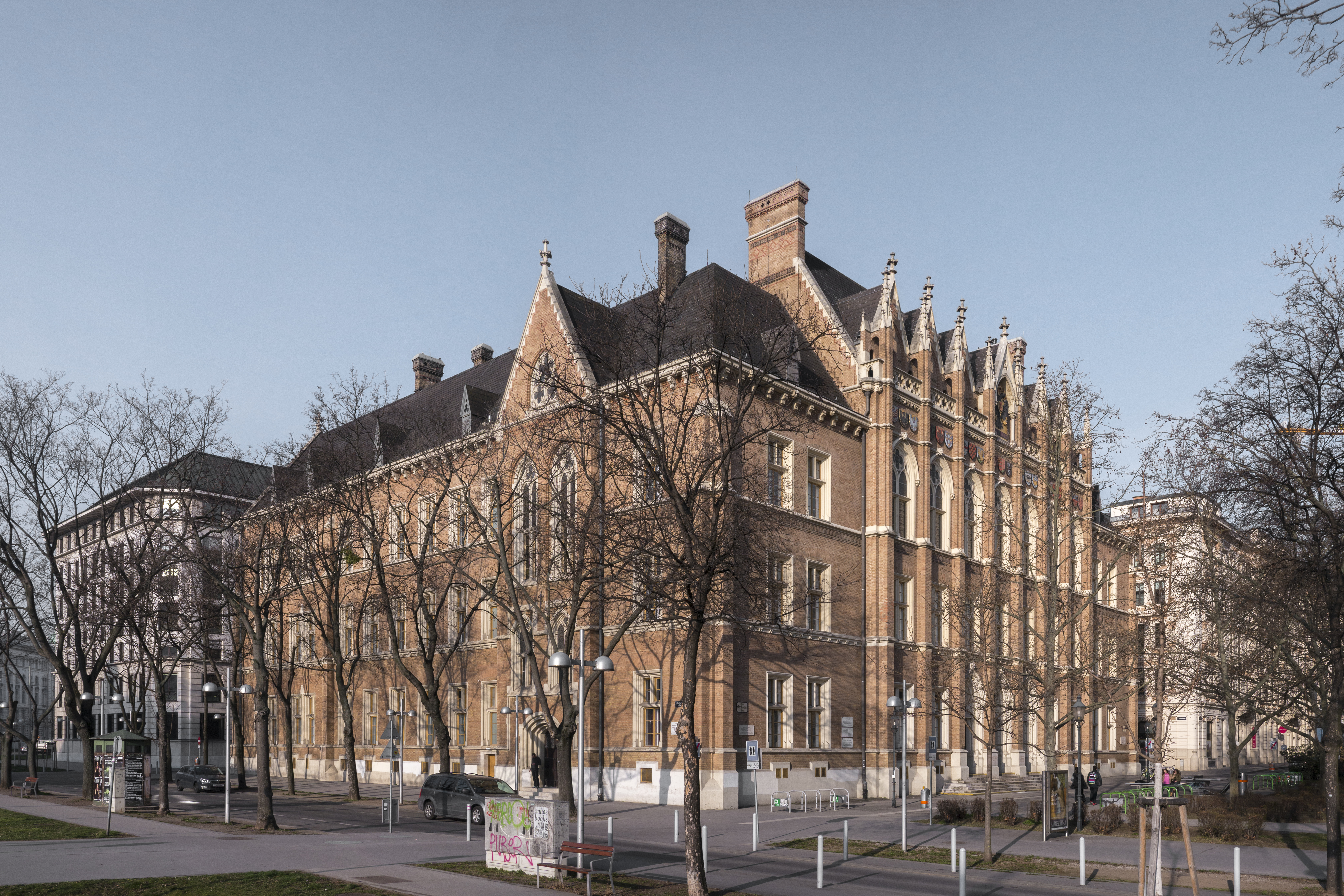 Akademisches Gymnasium